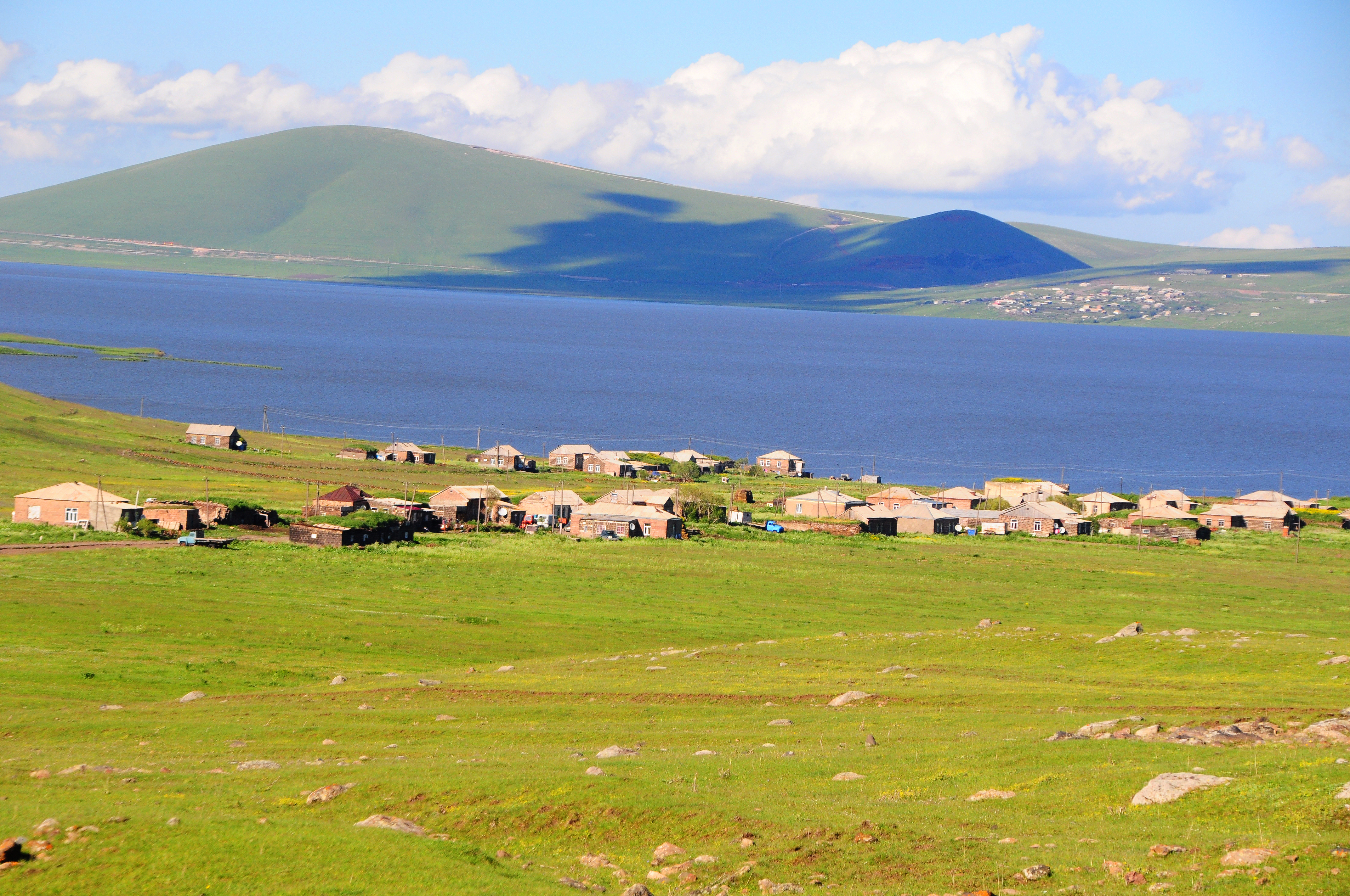 18640 Paravani